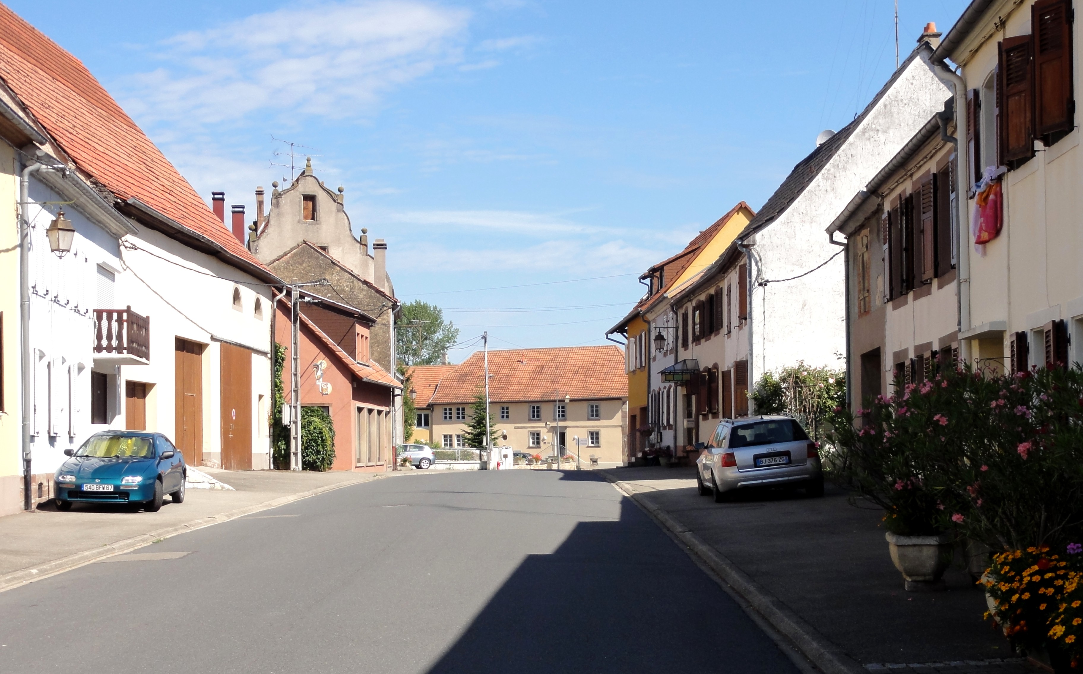 Alsace, Bas-Rhin, Sarrewerden